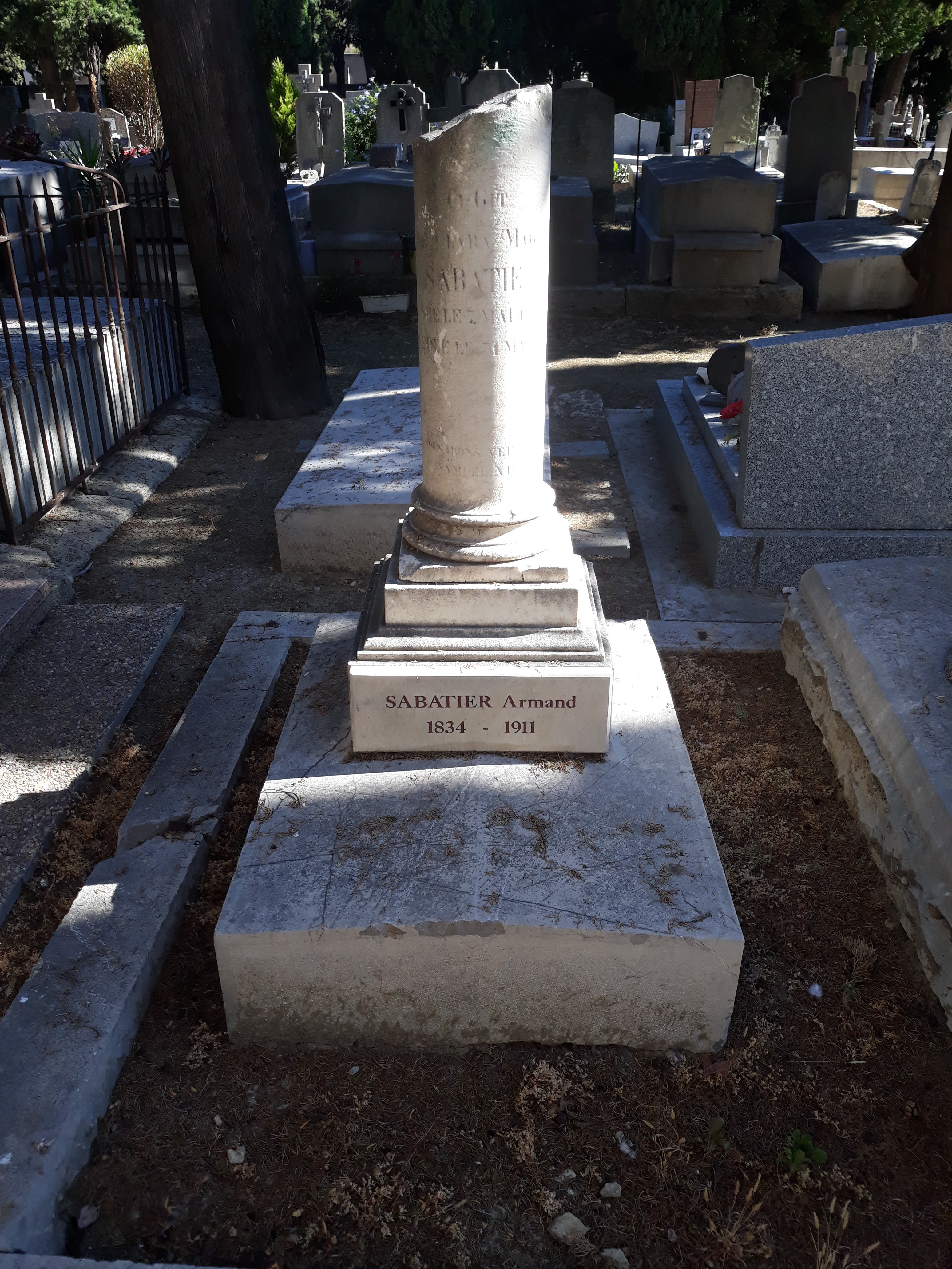 Das Grab des französischen Anatomen Armand Sabatier auf dem protestantischen Friedhof von Montpellier.